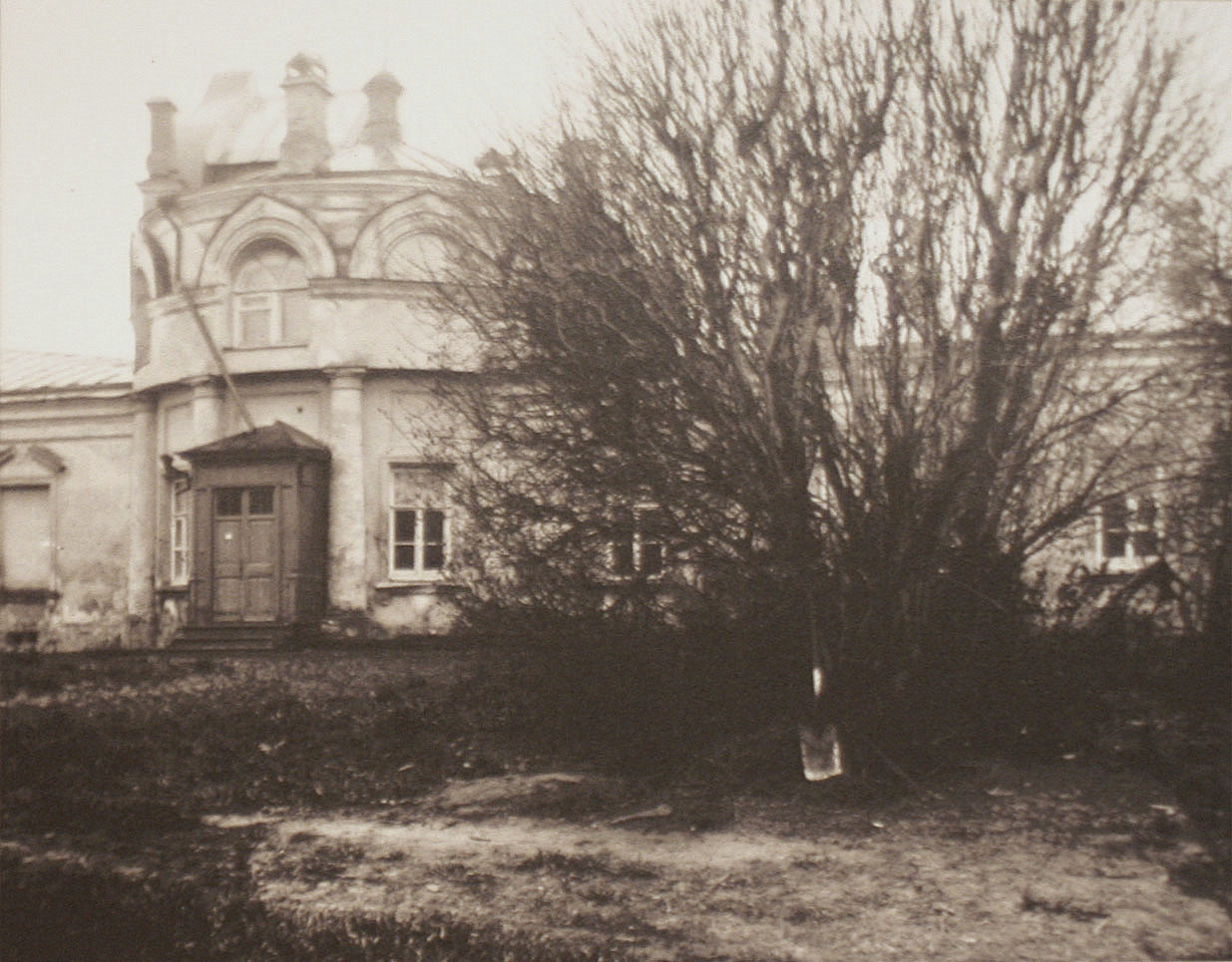 Дом-мастерская Исаака Ильича Левитана где было создано много знаменитых полотен художника - "Вечер. Золотой Плес", "После дождя. Плес". Валентин Серов написал здесь портрет художника.